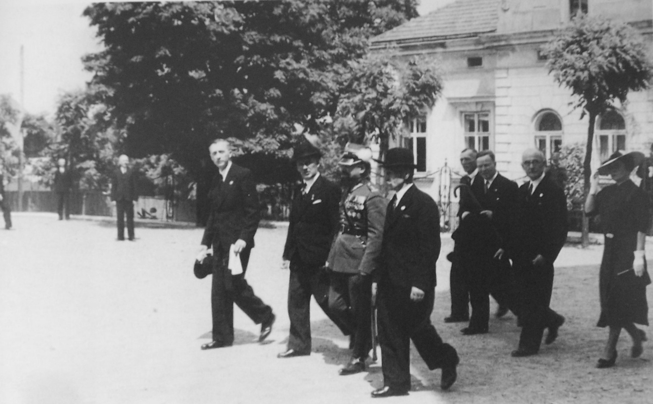 Zjazd absolwentów Państwowego Gimnazjum im. Królowej Zofii w Sanoku w jubileusz 50-lecia szkoły w 1938. W pierwszym rzędzie od prawej: Maksymilian Słuszkiewicz, płk Zygmunt Csadek, Wojciech Bucior, Juliusz Zaleski. W drugim rzędzie od prawej: Zofia Skołozdro, Andrzej Grasela, Michał Bartkowski. Autor fotografii: Franciszek Strachocki